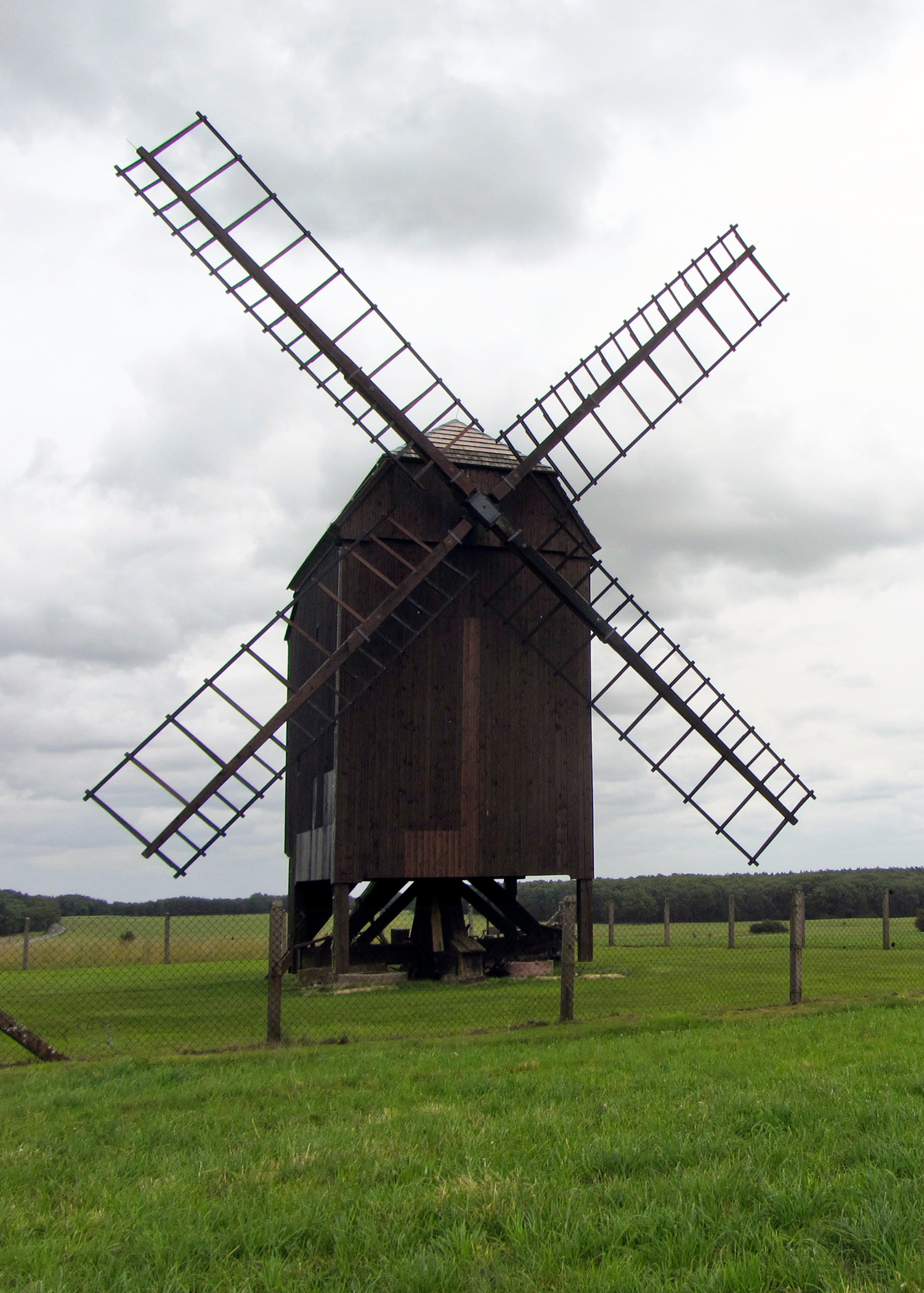 Bockwindmühle, Reudnitzer Straße in Cavertitz OT Zeuckritz